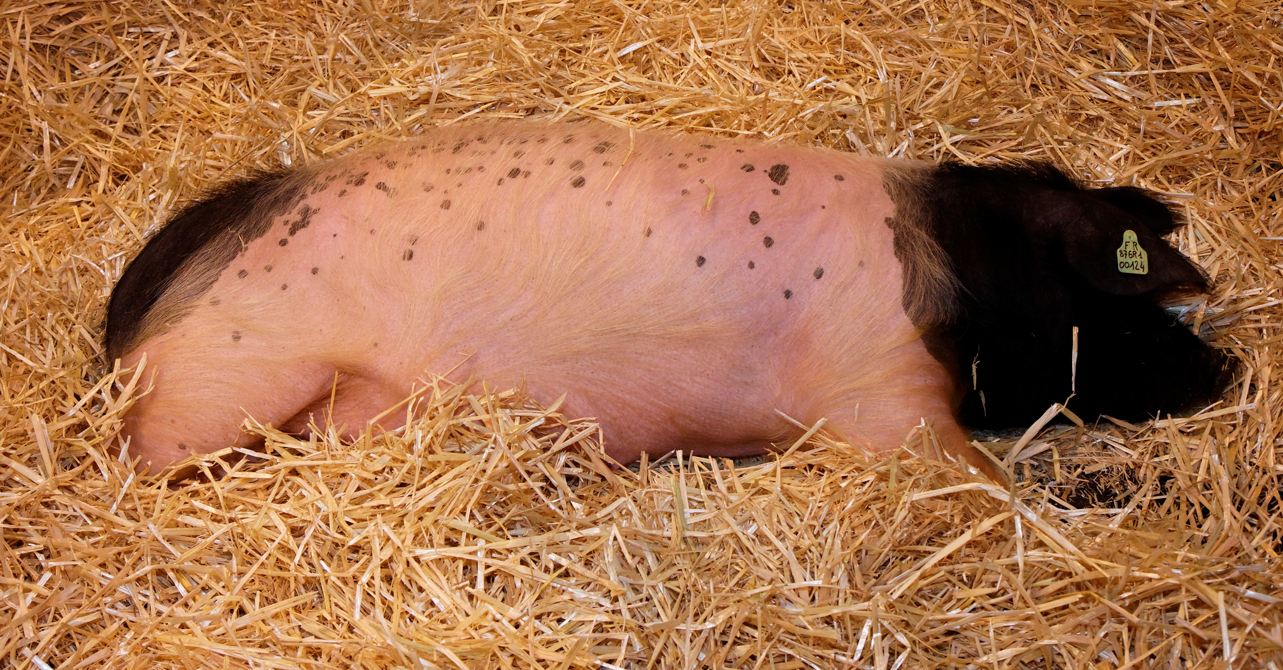 Le salon de l'agriculture de Paris en 2011. Porc cul noir Limousin, salon de l'agriculture, 2011